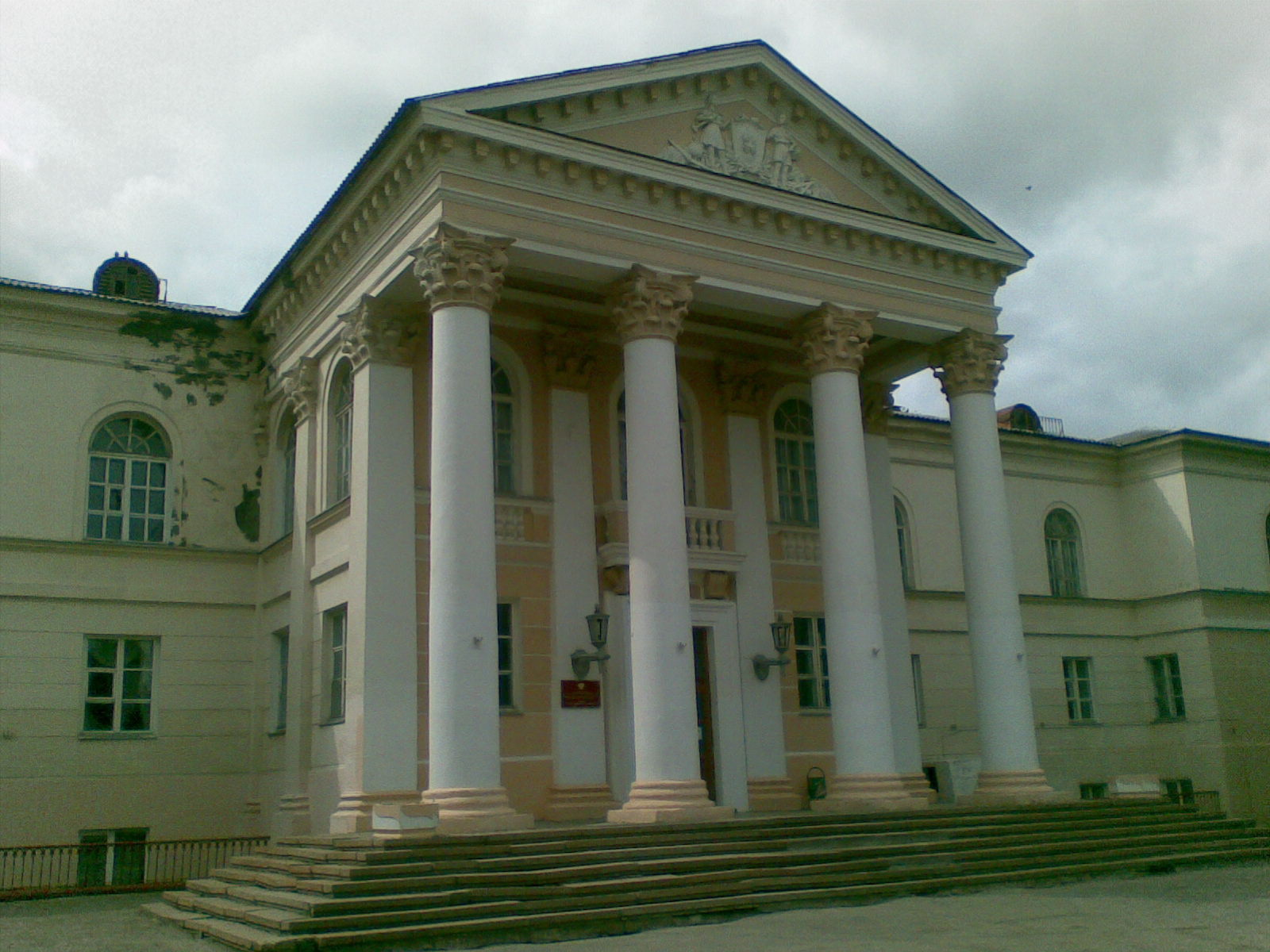 Дворец детского и юношеского творчества (бывший Дворец пионеров) г. Новомосковска, ул. Присягина, 9.